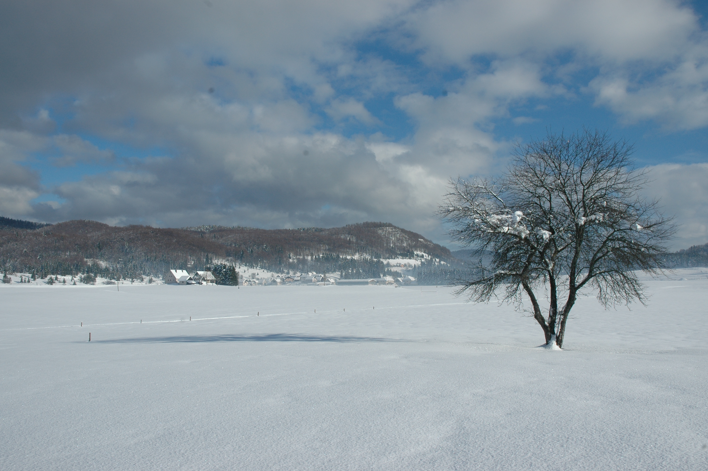 Pogled na del Babnega Polja z Bukovico in Hribom